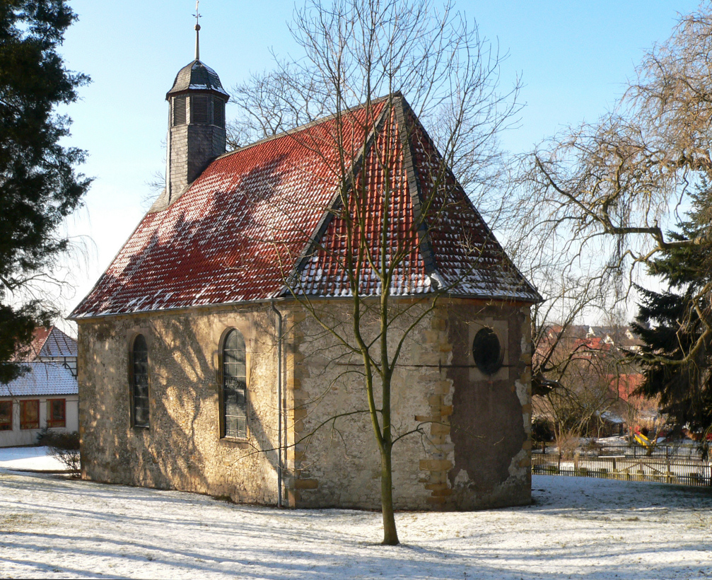 Kapelle in Oelber